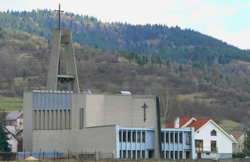 kostol zborov nad bystricou